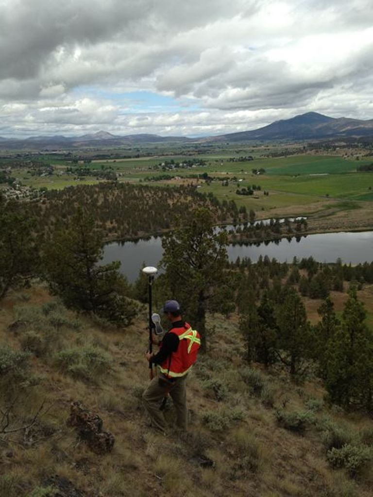 Barnes Butte Reservoir near Prineville, Oregon Photo by Markell Hamm/BLM Oregon